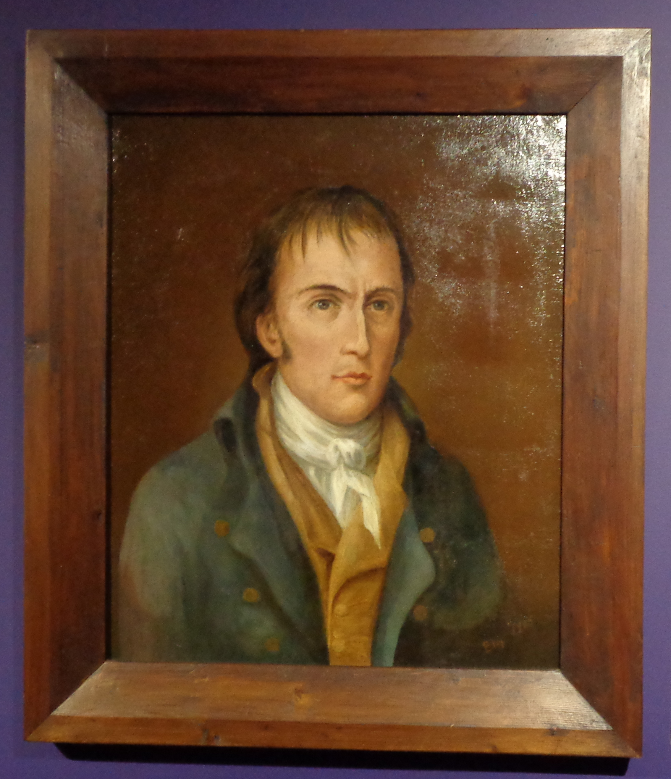 Óleo de João Elói do Amaral, de 1905, representando Bocage